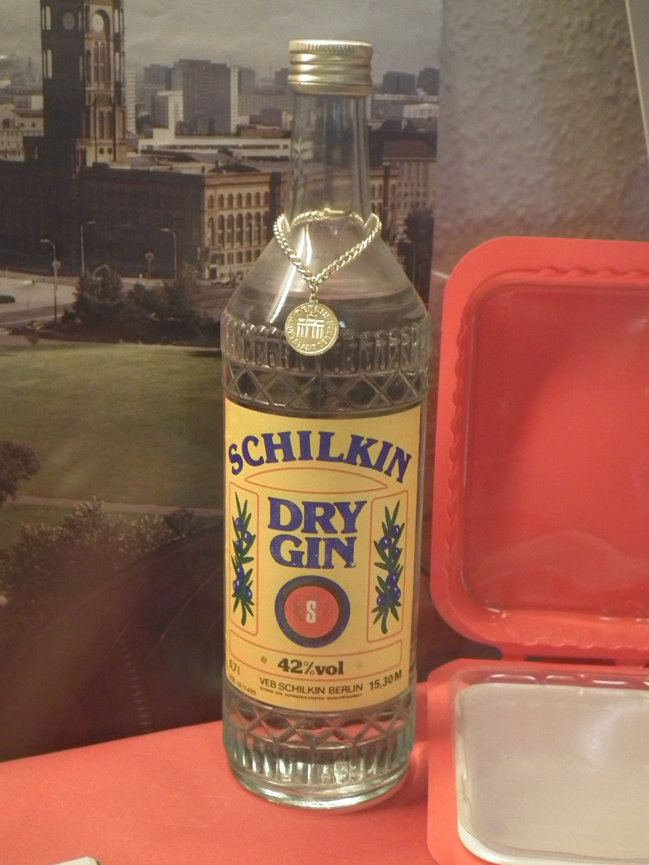 VEB Schilkin Berlin Dry Gin, DDR-Museum Pirna, Veröffentlicht mit Genehmigung der Museumsleitung